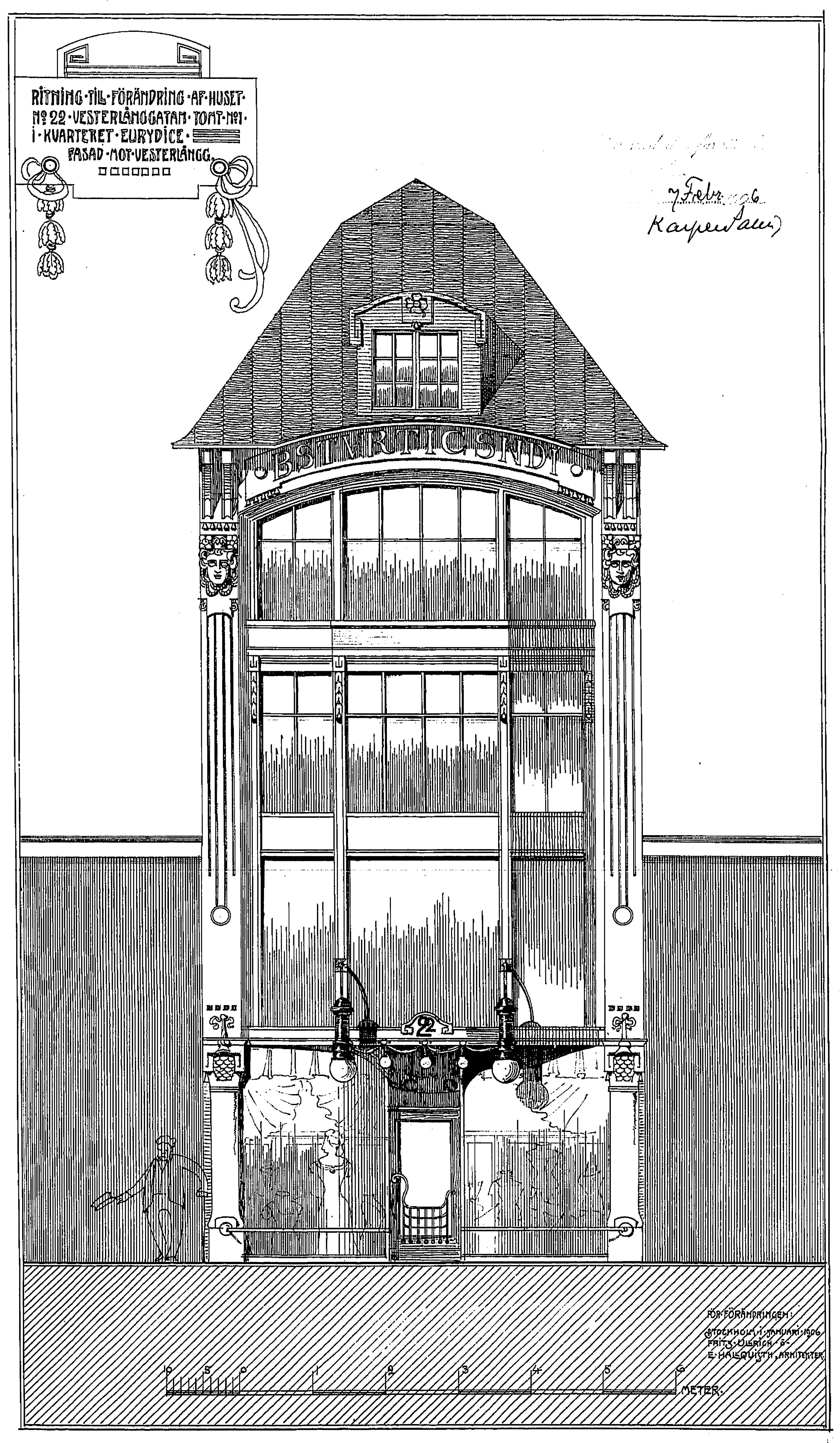 Västerlånggatan 22 (fastigheten Eurydice 1), sedan 1974 Hotel Lord Nelson